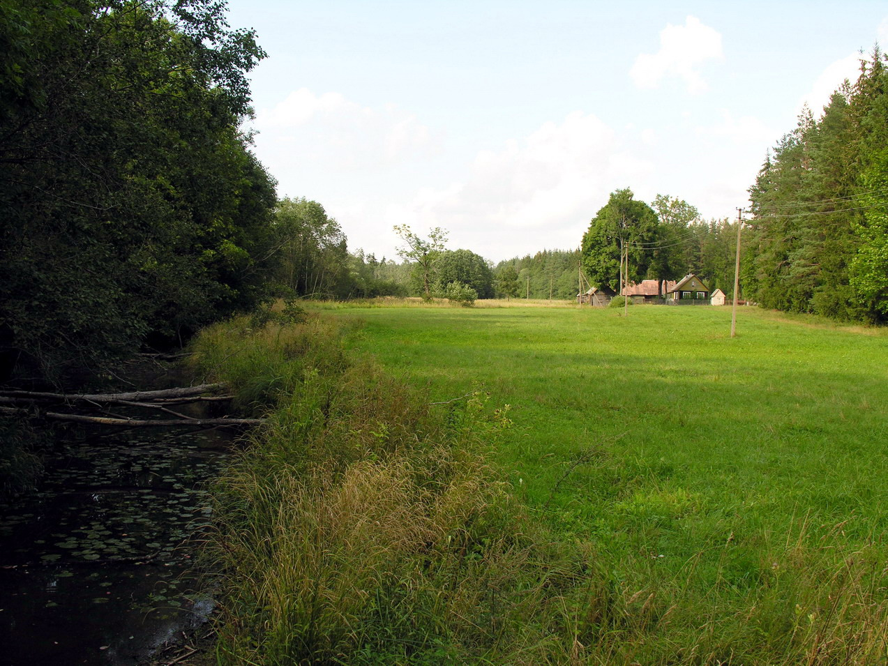 Uogys, Mažeikių raj., Viekšnių seniūnija Uogys teka per Ramoniškę Foto: Algirdas, 2006 m. rugpjūčio 15 d., Lietuva